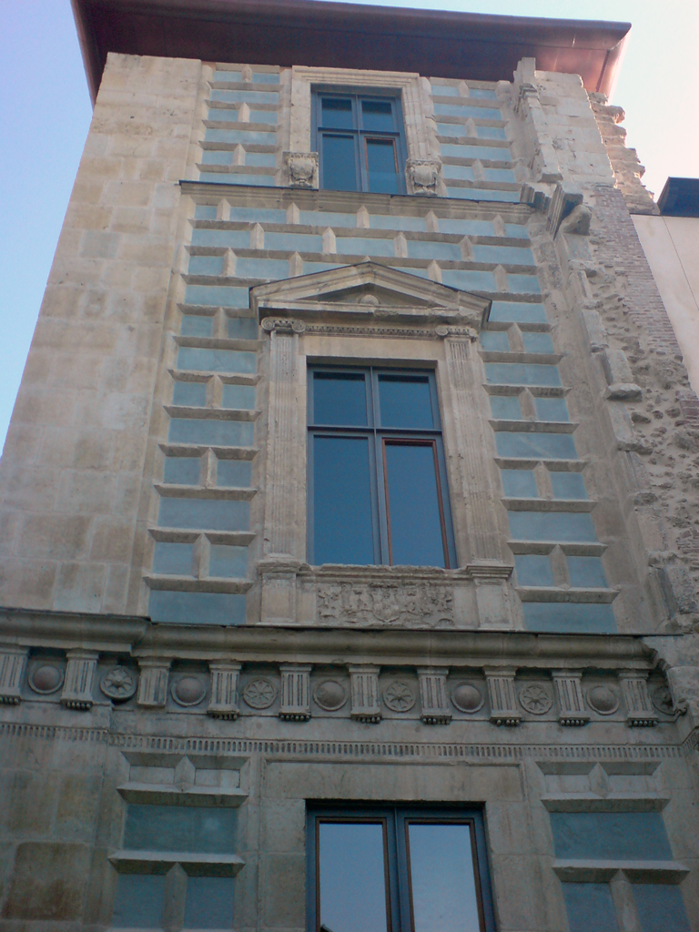 Torre del palacio del Conde Luna.